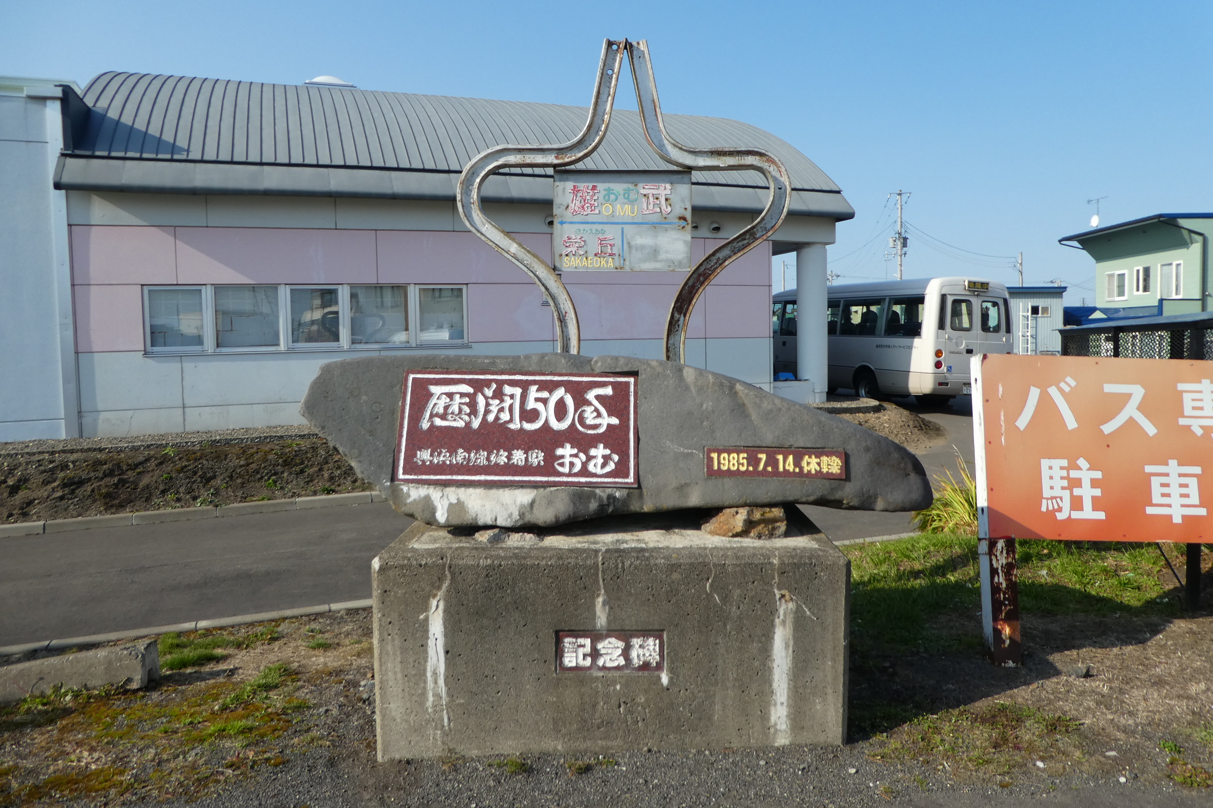 雄武駅跡地に建つ記念碑。